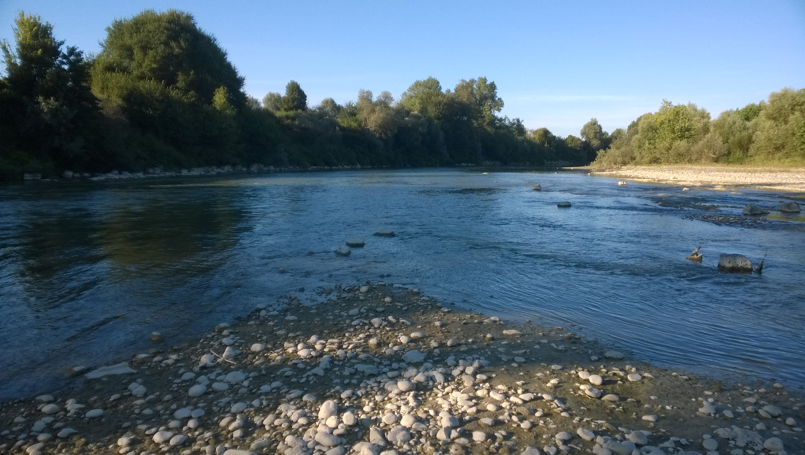 Il fiume Tanaro nei pressi di Asti (Italia).